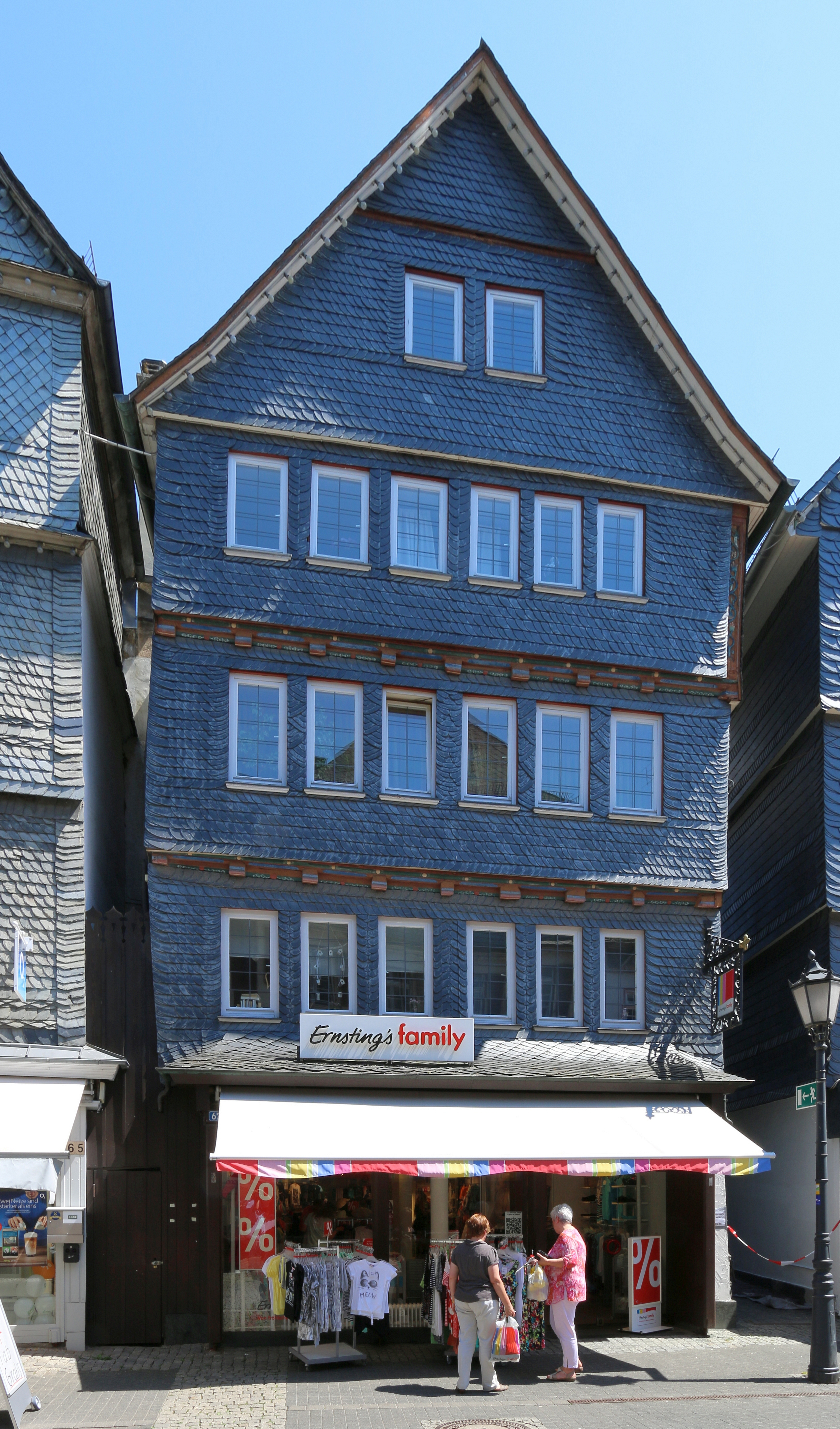 Herborn, Lahn-Dill-Kreis: Fachwerkhaus Hauptstraße 67-69